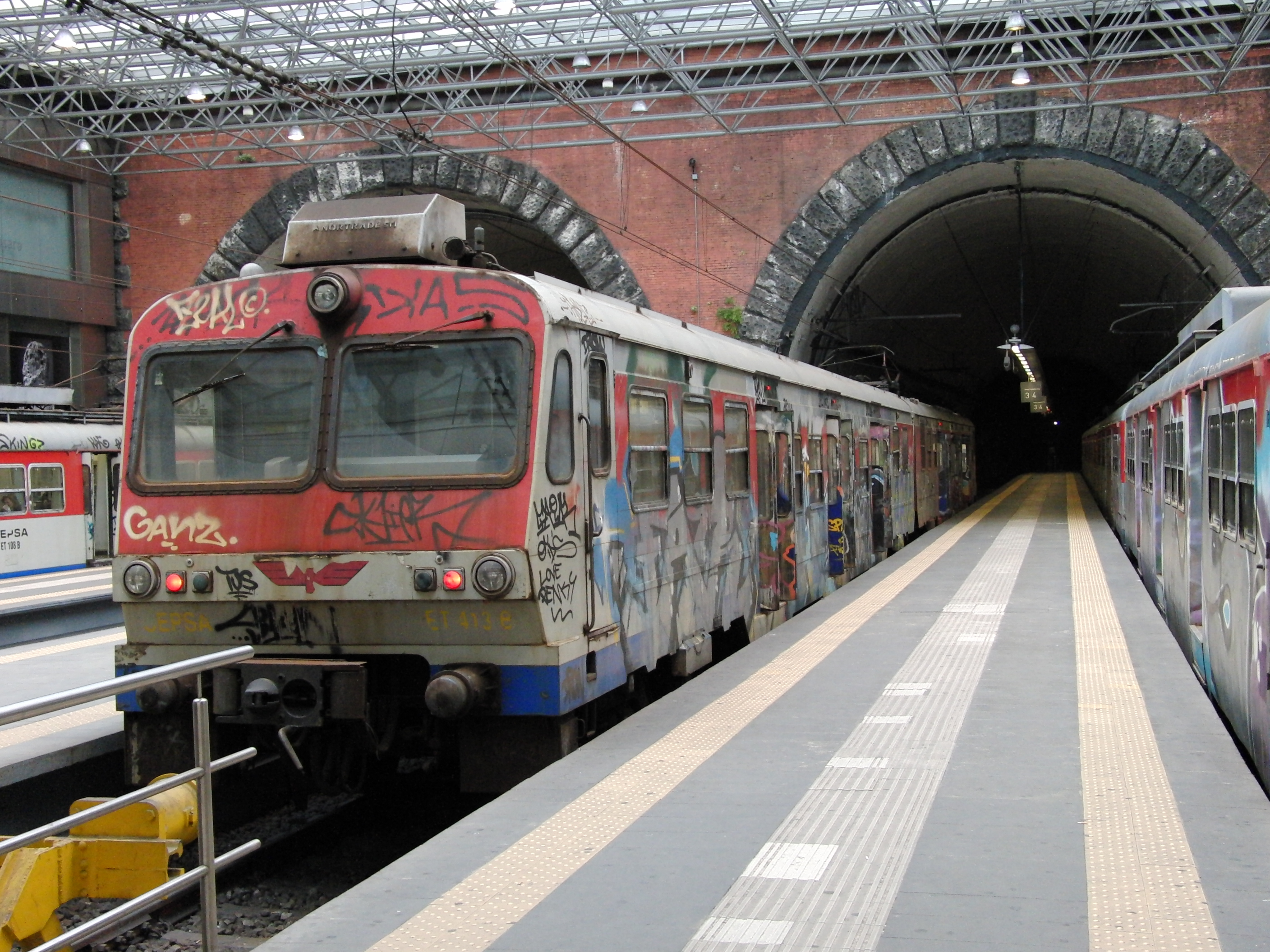 Elettrotreno ET.413 della SEPSA in sosta a Napoli Montesanto